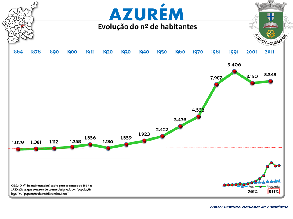 Evolução da População 1864 / 2011